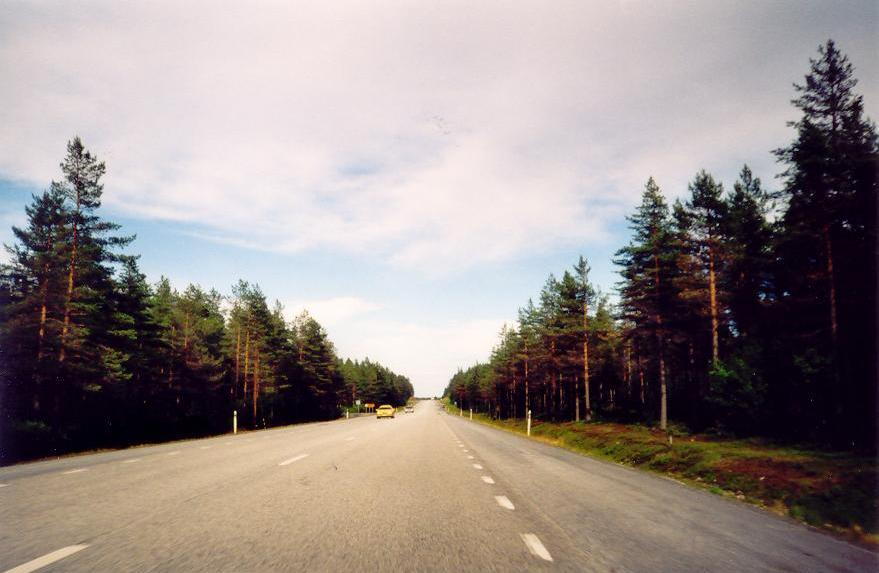 E4 utanför Örnsköldsvik.